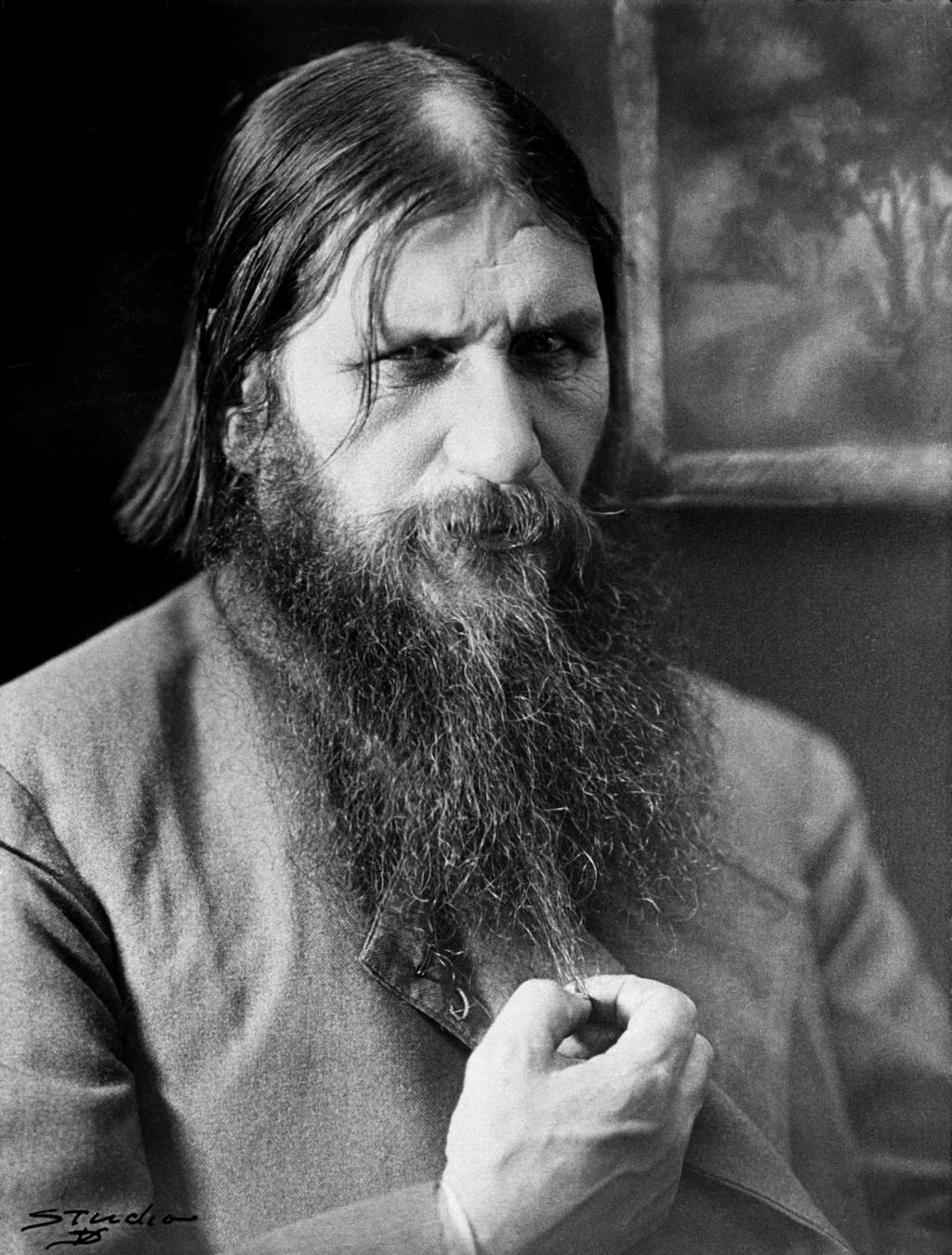 Grigori Rasputin (1864-1916)